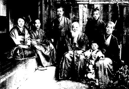 川路寛堂一家 学習院大学史料館所蔵 （裏書） 大正九年十二月三十一日 神戸市葺合熊内川路ニ於テ撮影ス 正面白髯翁 川路寛堂 弘化元年生 其左方婦人 寛堂室貞子 安政六年生 横面ニ在ル婦人 川路誠妻せい子 並ビタル男子 川路誠 寛堂嗣子 立像 島崎定次郎 同少年 島崎光一 小児 川路誠ノ長女 克子 誠者即ち柳虹